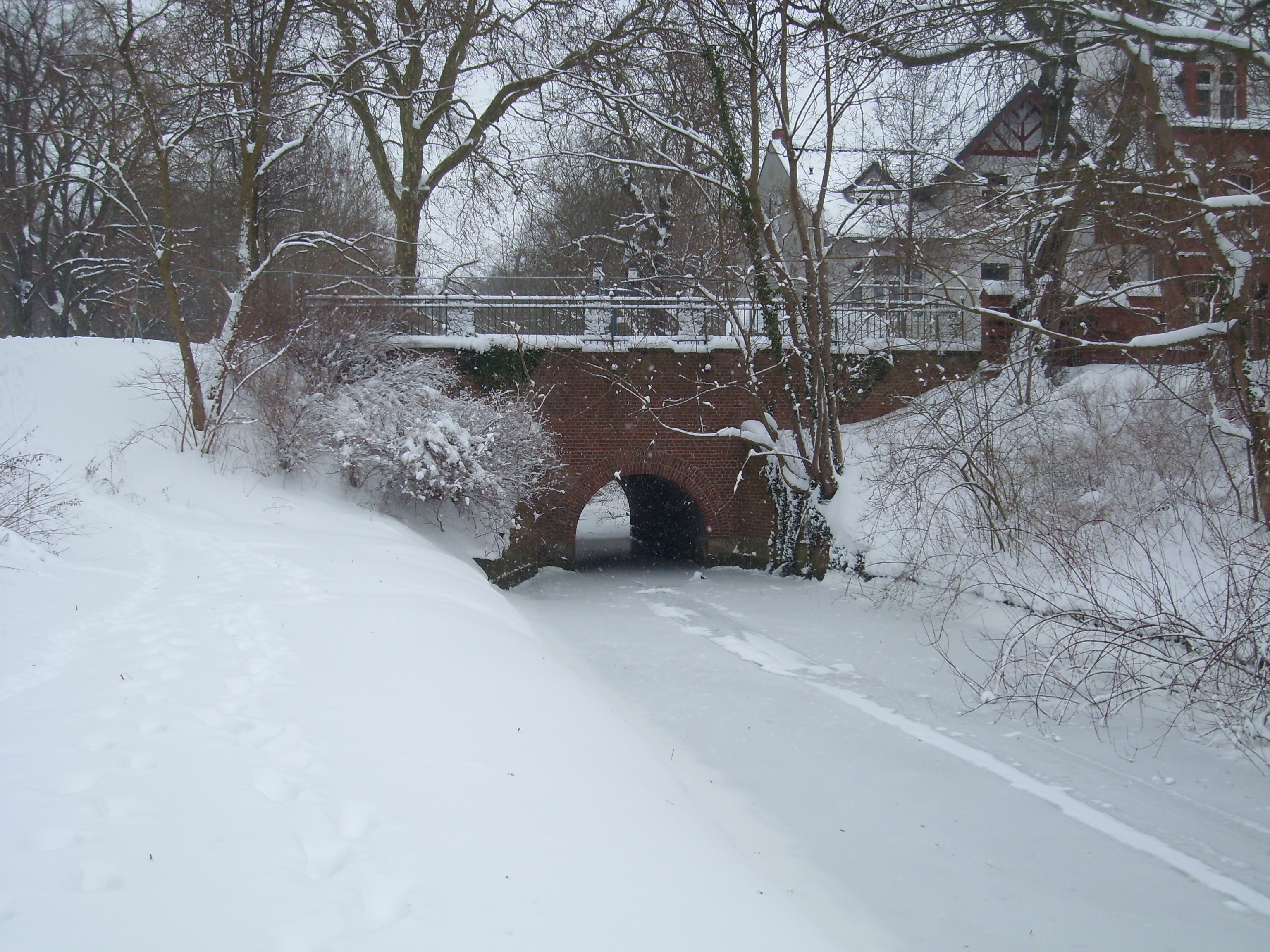 Straßenbrücke über den Stadtgraben (Martin-Luther-Straße) von Westen aus gesehen